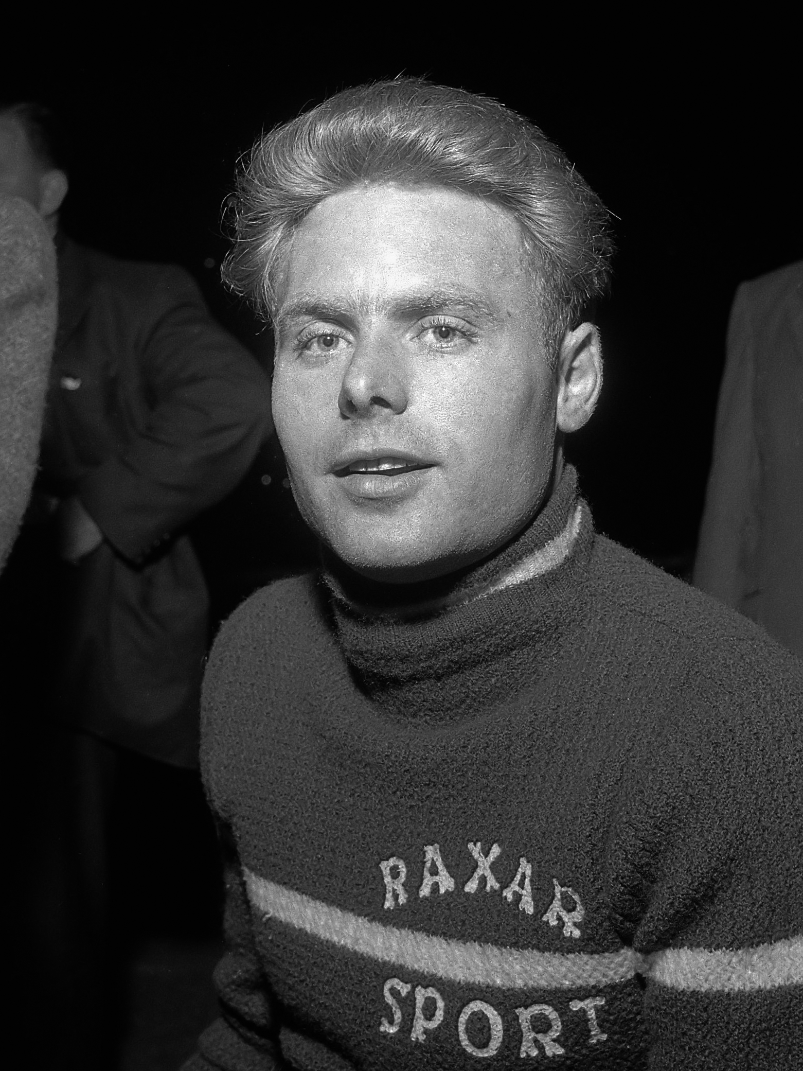 Wielrenners. De Paepe , demi-fond stayer beroeps (Belgie) 1 augustus 1957